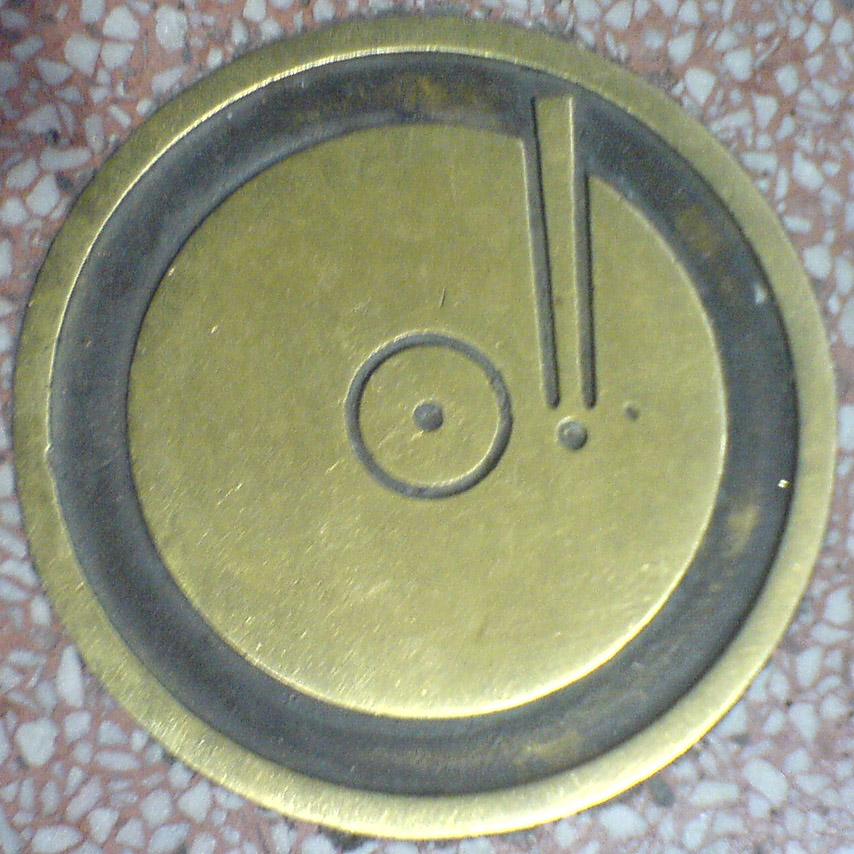 Symbol der Kategorie Musik (recording) der Sterne auf dem Hollywood Walk of Fame.